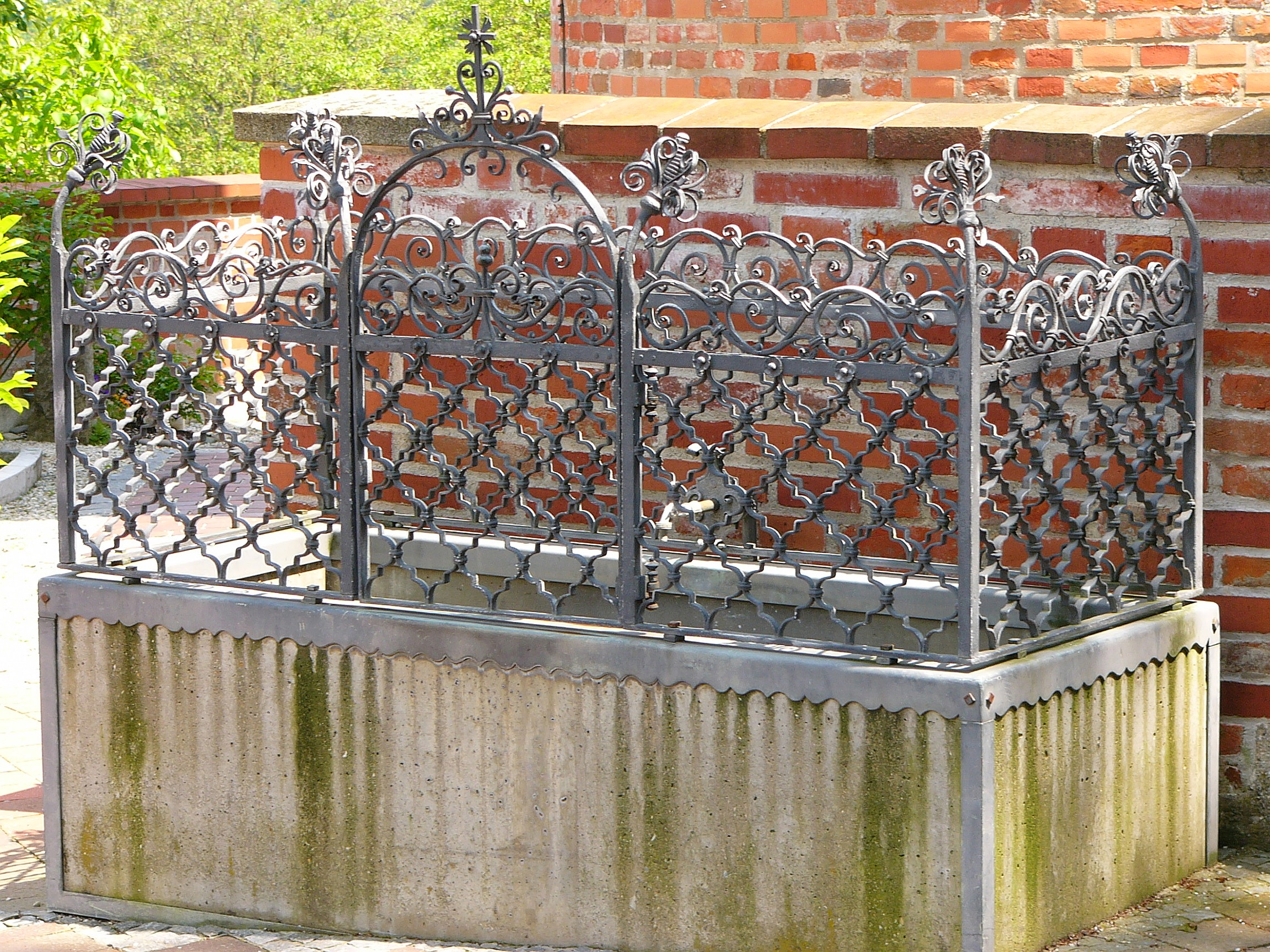 Kath. Pfarrkirche Hl. Blut einschiffige, gewölbte Anlage, spätgotisch, Mitte 15. Jh., an der Westseite Vorhalle und zwei runde Flankentürme; mit Ausstattung; Friedhofsummauerung, wohl im Kern noch spätmittelalterlich; Leichenhalle, 2. Hälfte 19. Jh.; Grabmal des Pfarrers Anton Mayr, neugotisch von Wilhelm Schweinberger 1870; vor der Kirche Wasserbecken mit schmiedeeisernem Gitter, 19. Jh. This is a photograph of an architectural monument.